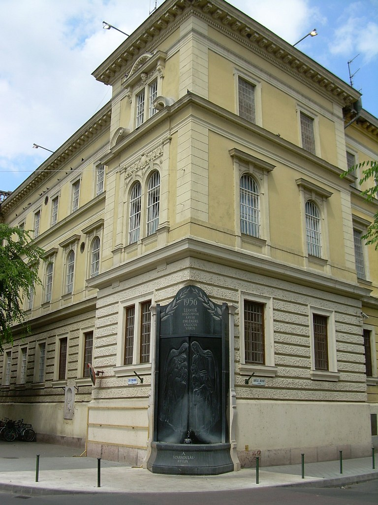 Kalocsai Fegyház és Börtön This is a photo of a monument in Hungary. Identifier: 90101